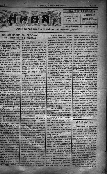 Хасковският вестник "Нива"